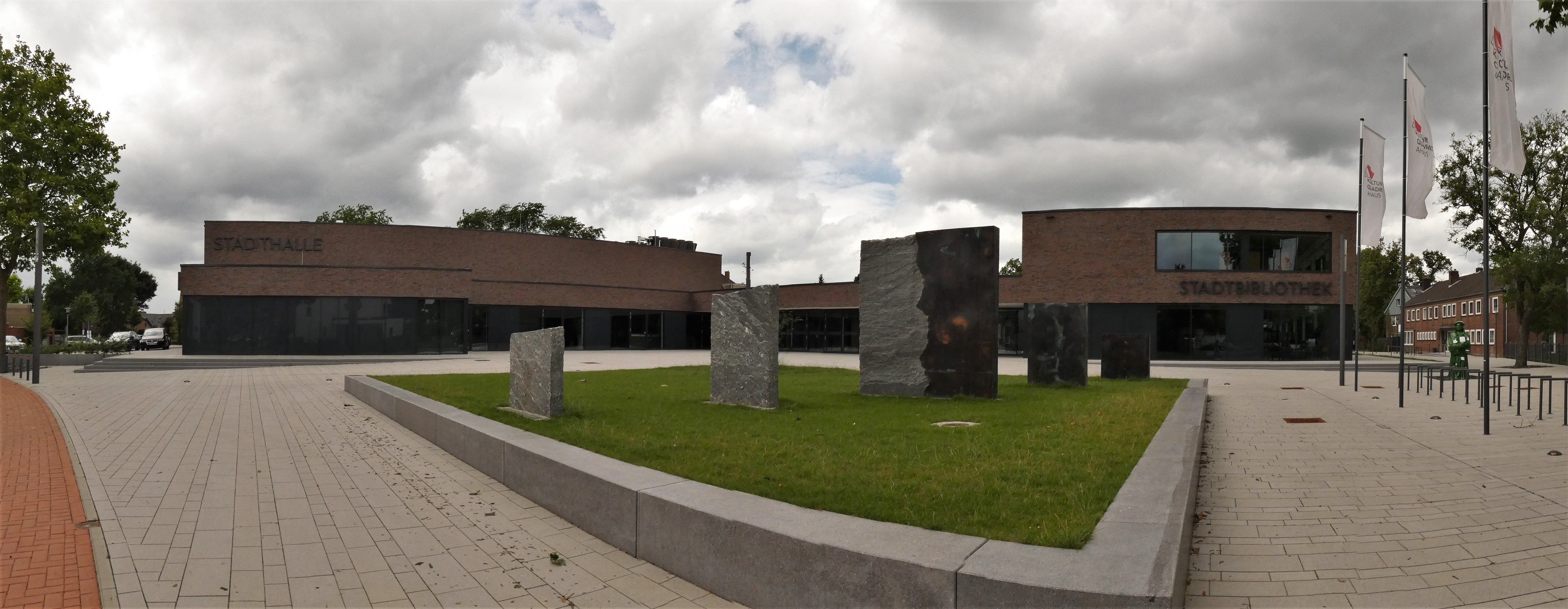 Panorama der Stadthalle Ahaus sowie der Stadtbibliothek, davor die Skulptur "Annäherung" von Piotr Sonnewend